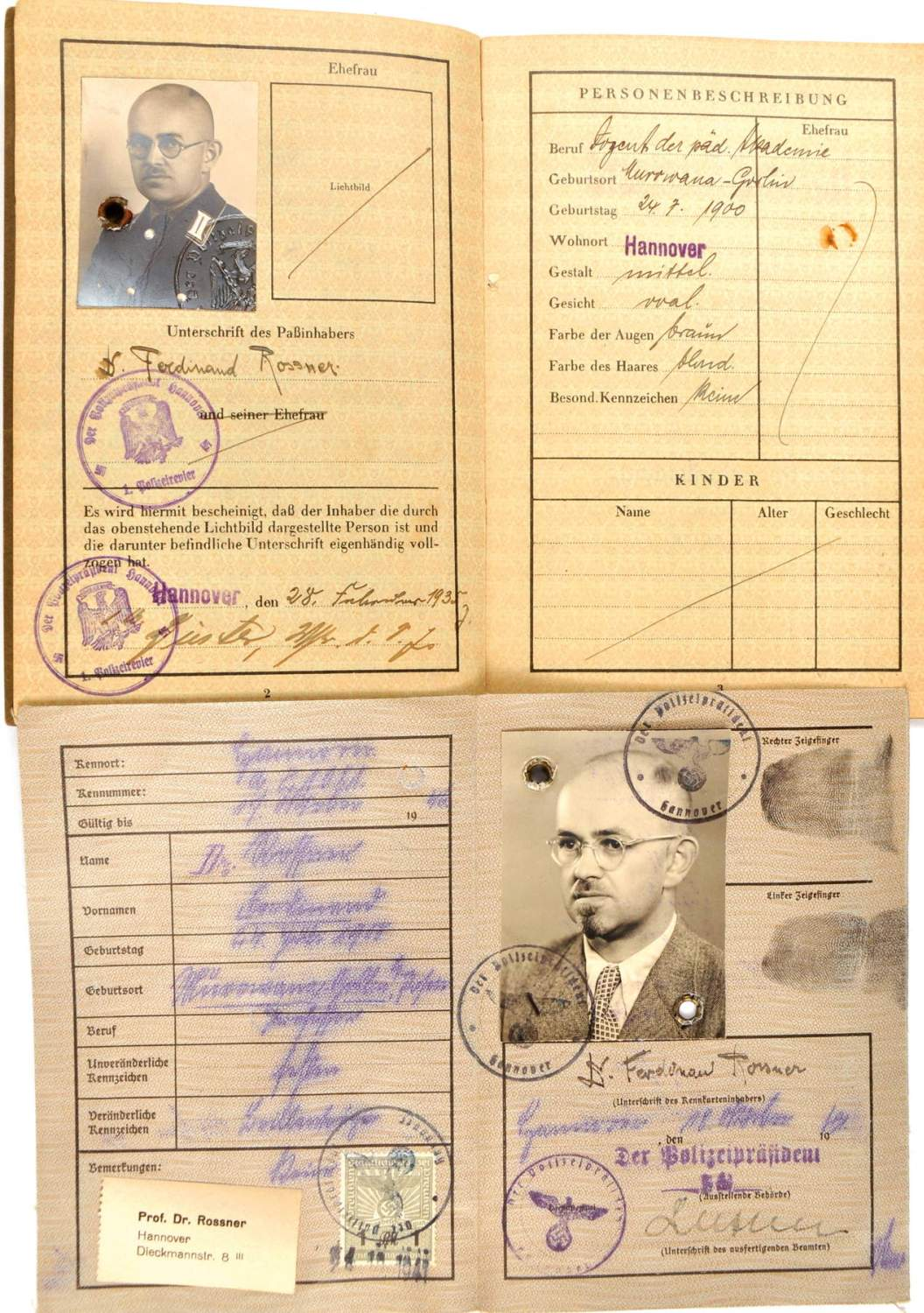 Für den Biologen, nationalsozialistischen Rassentheoretiker und Hochschullehrer Ferdinand Rossner (1900-1987) am 27.2.1935 in Hannover ausgestellter Reisepass mit diversenVisa-Stempeln für der Ein- u. Ausreise in das Deutsche Reich, Österreich und Italien mit einem Uniformfoto. Darunter eine am 18.10.1941 in Hannover ausgestellte Kennkarte mit einem jüngeren Lichtbild und einem Aufkleber mit den Daten für den "Prof. Dr." und der Wohnsitz-Angabe "Dieckmannstr. 8 III" in Hannover ...